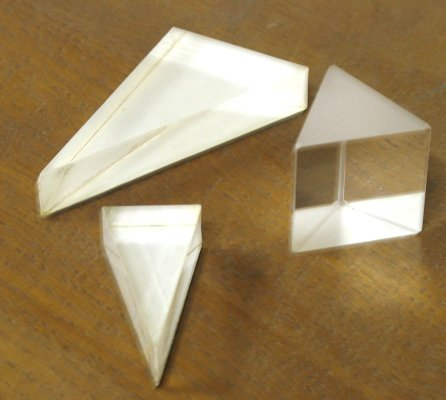 3 prismes de formes différentes et de matière différentes (plexiglas et verre) Photographie personnelle